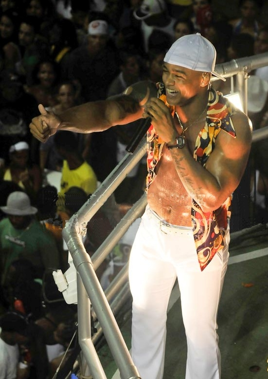 Léo Santanna vocalista do Parangolé no Carnaval 2010.